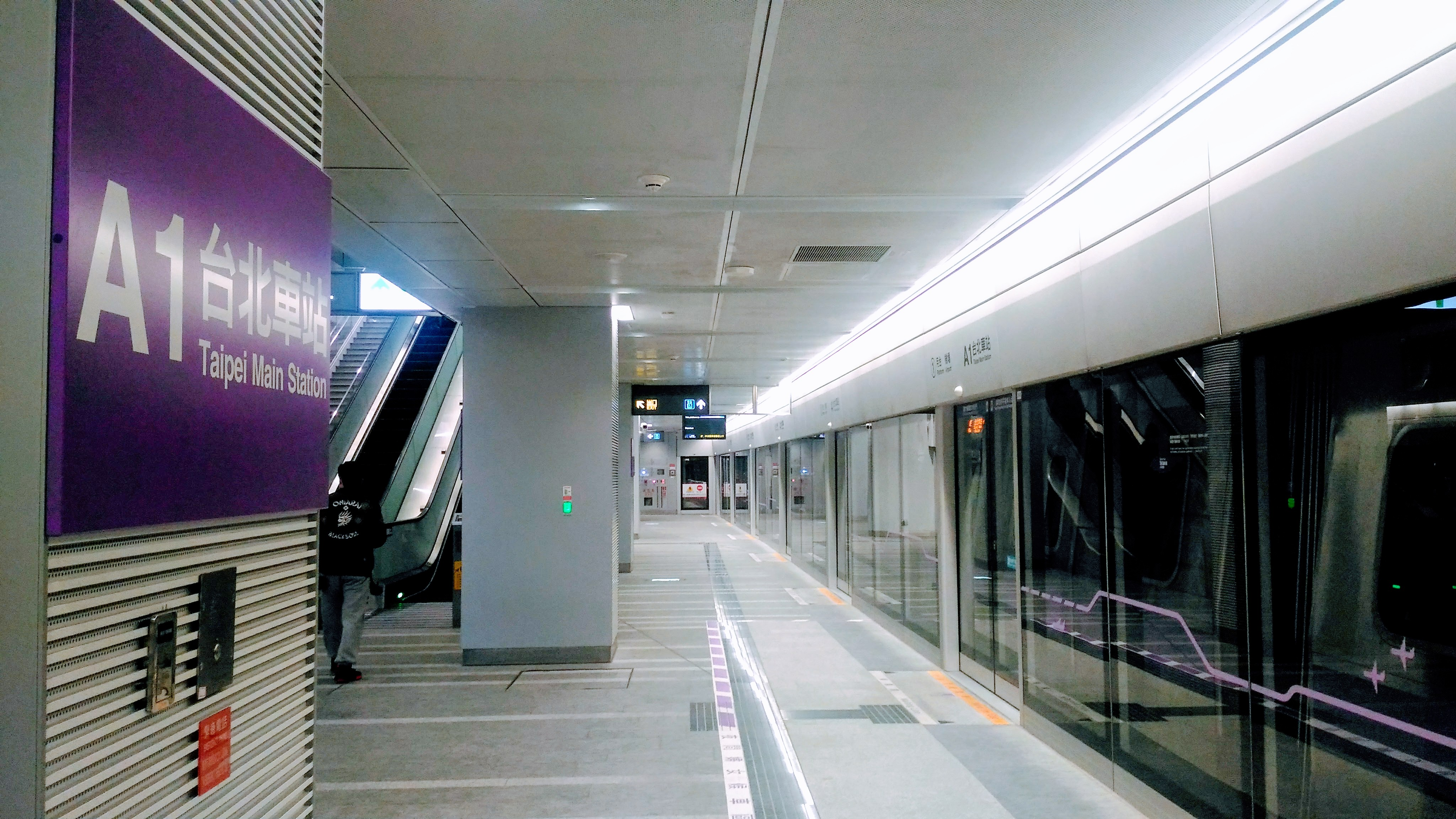 桃園國際機場捷運台北車站第一月台站名牌。